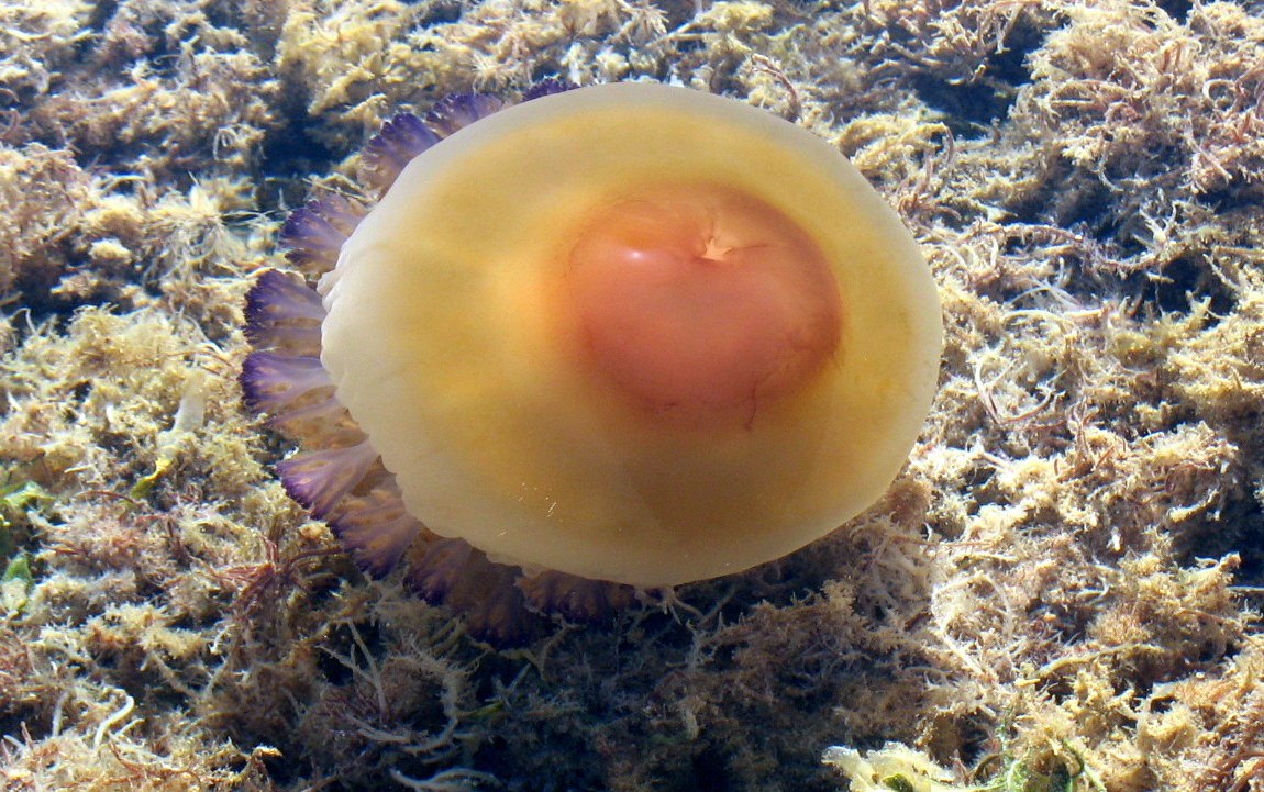 Cotylorhiza tuberculata - Mar Menor (Los Alcázares, Murcia, España). Vista de la umbrela.